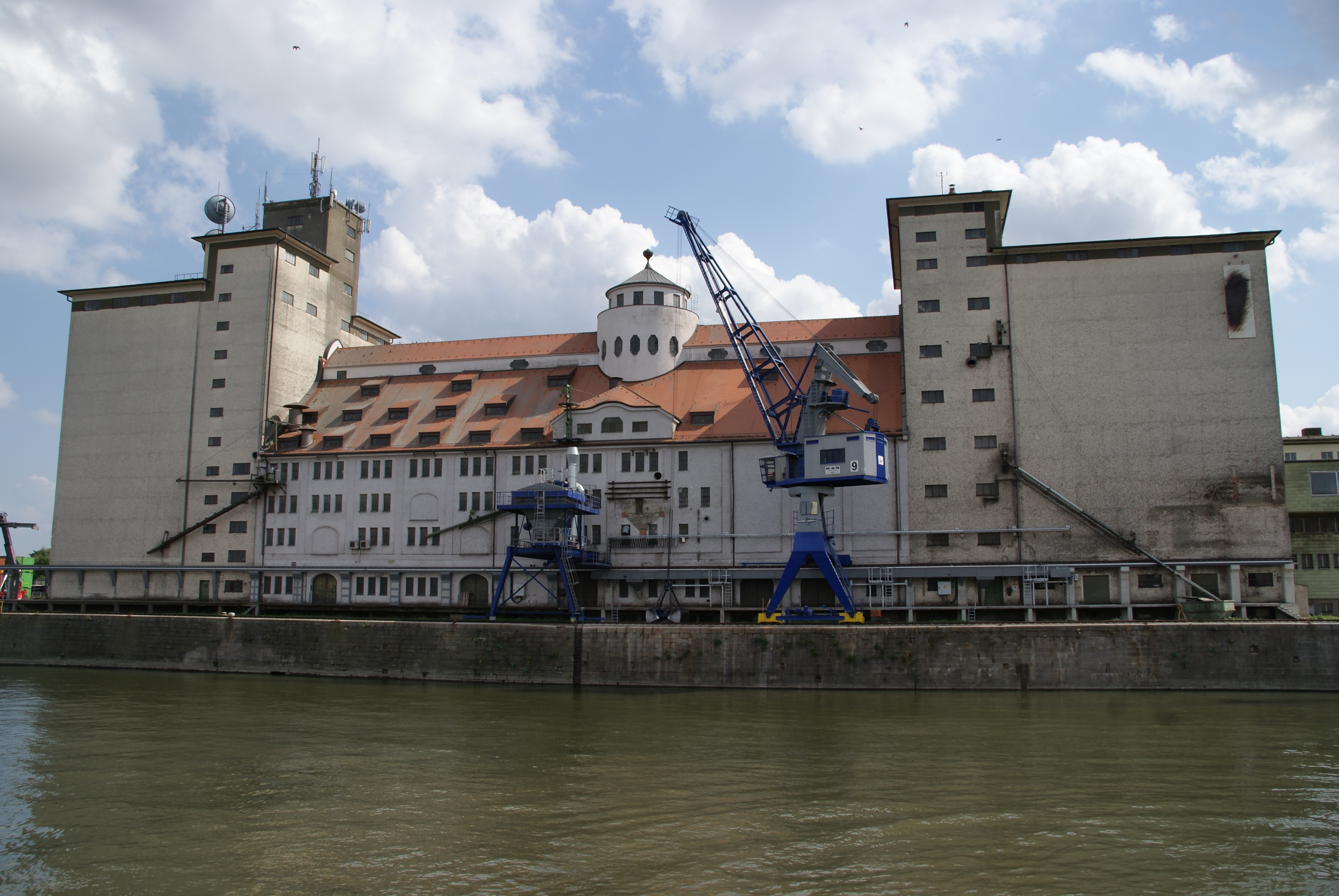 Stadtlagerhaus - Denkmalgeschütztes Silogebäude im Regensburger Westhafen